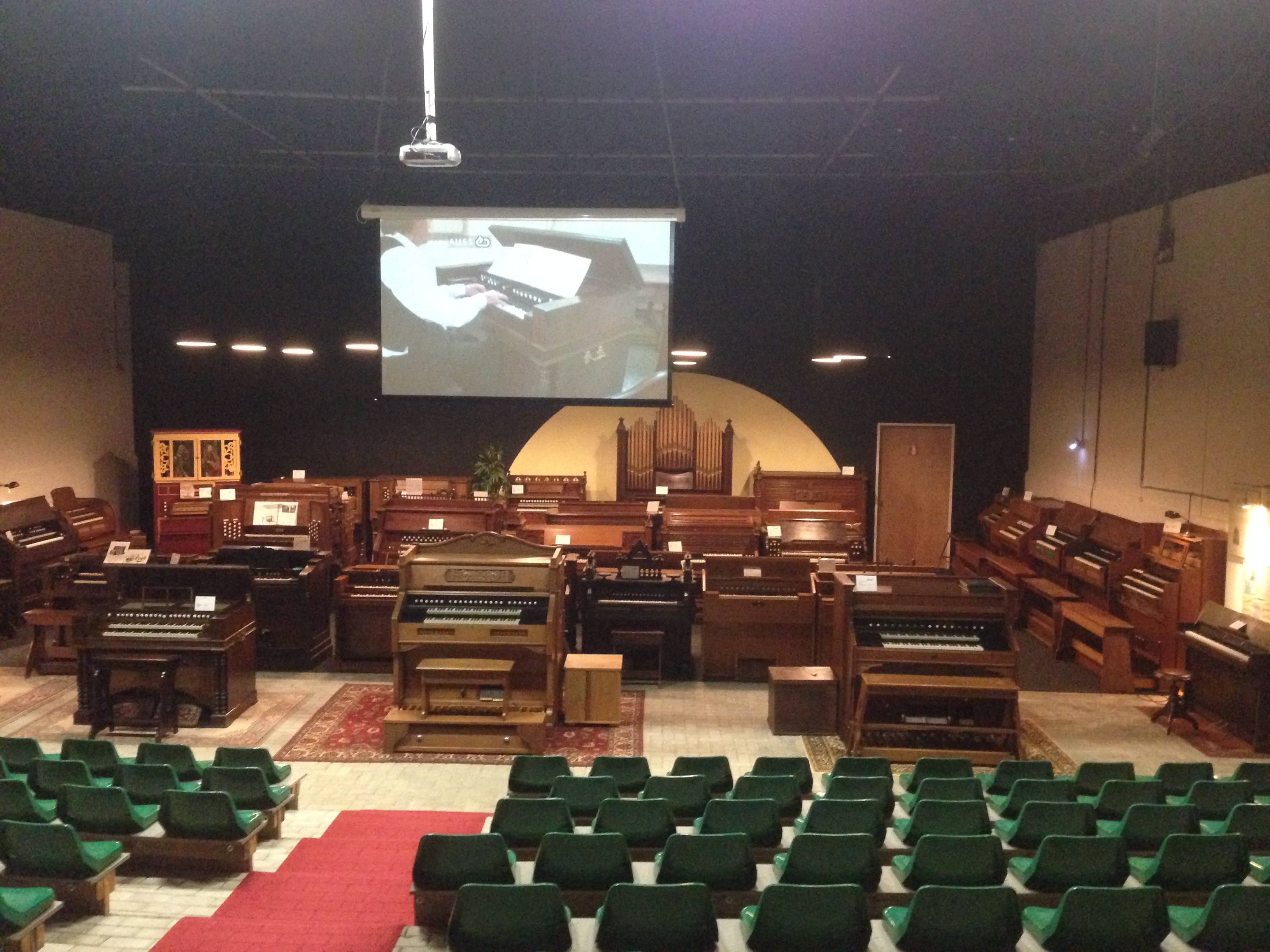 Harmonium Museum Nederland, Veenpark, Barger-Compascuum, Netherlands